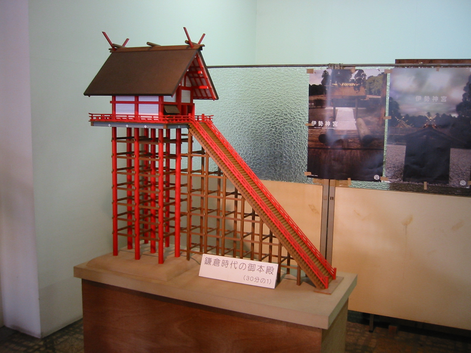 鎌倉時代出雲大社模型 古代出雲大社模型展示館「雲太」(うんた)にて